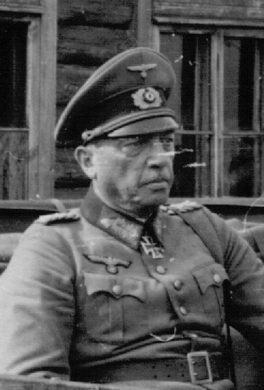 German general Georg von Küchler